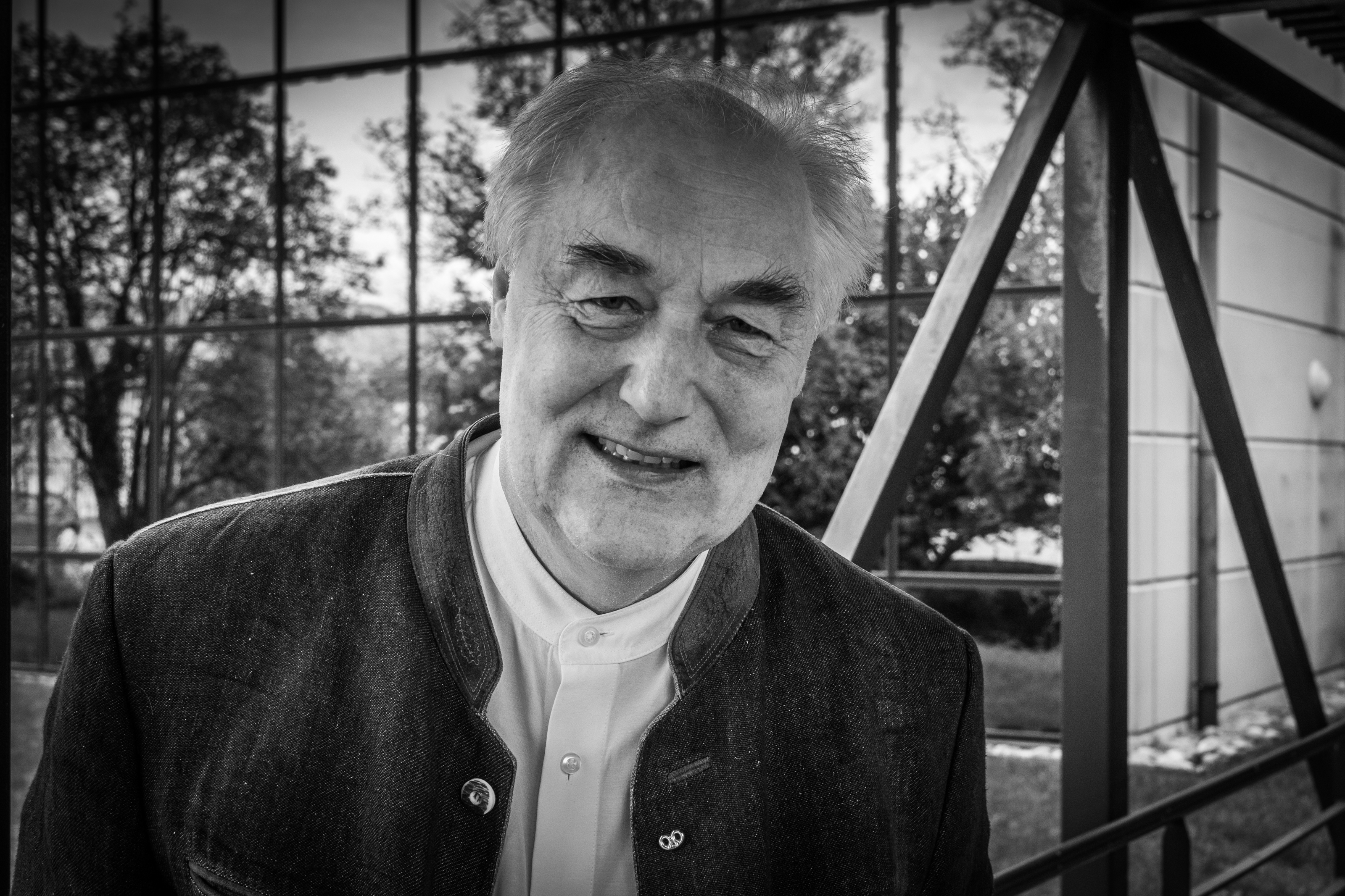 Hervé This par Claude Truong-Ngoc